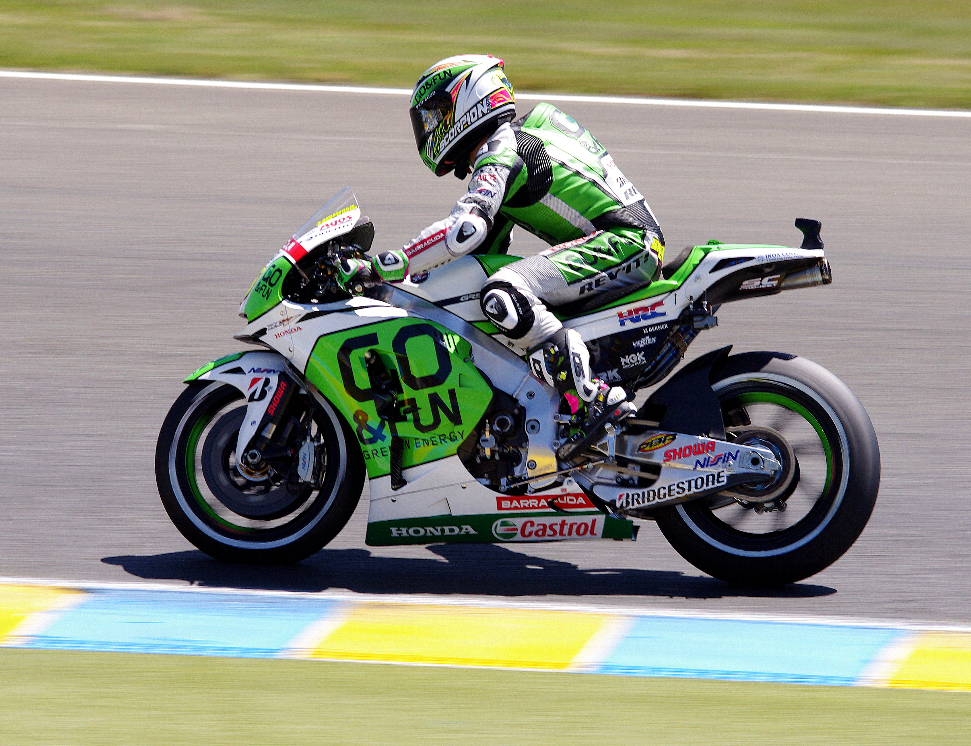 Alvaro BAUTISTA - GO&FUN Honda Gresini - MotoGP 2014 - Le Mans